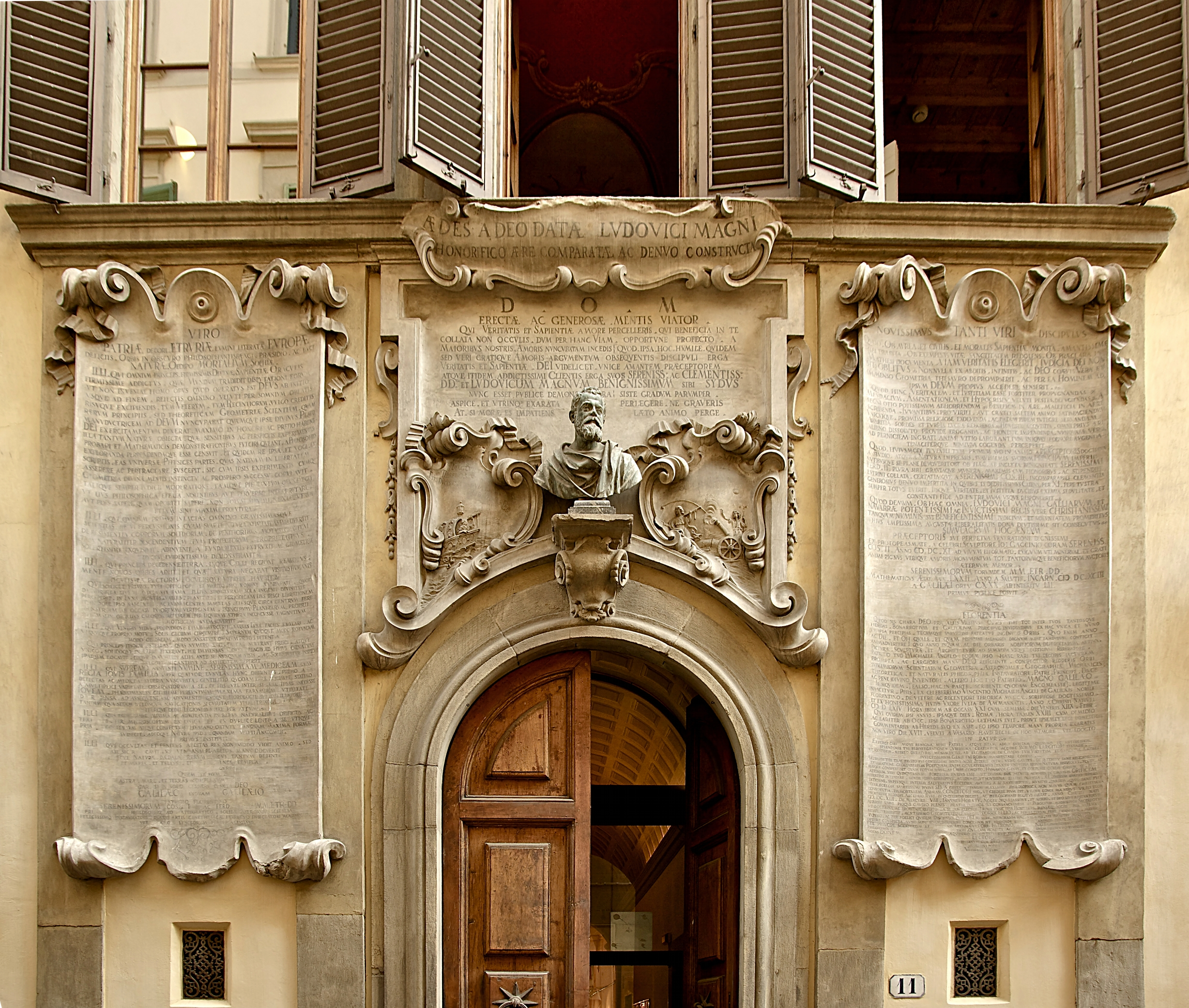 Au 11 de la via sant'Antonino à Florence (Italie) l'entrée du "Palazzo dei Cartelloni" (le palais des placards, des affiches), en fait Palazzo Viviani, ornée de panneaux à la gloire de Galilée et d'un buste le représentant, par les soins de son élève, Vincenzo Viviani (1622-1703).